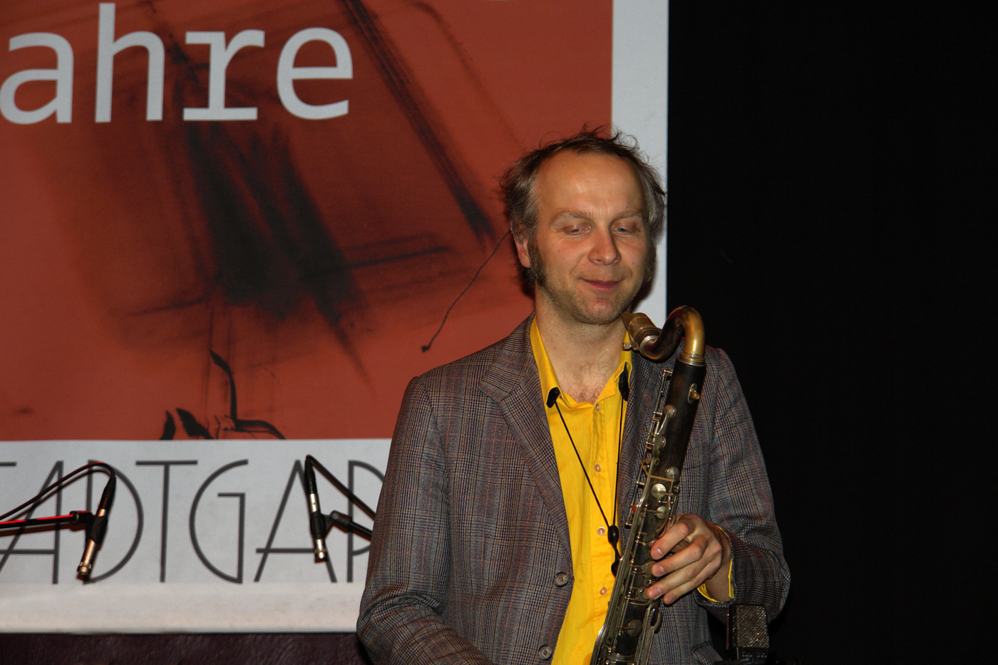 Rudi Mahall, Bassklarinettist, Deutschland (Germany)